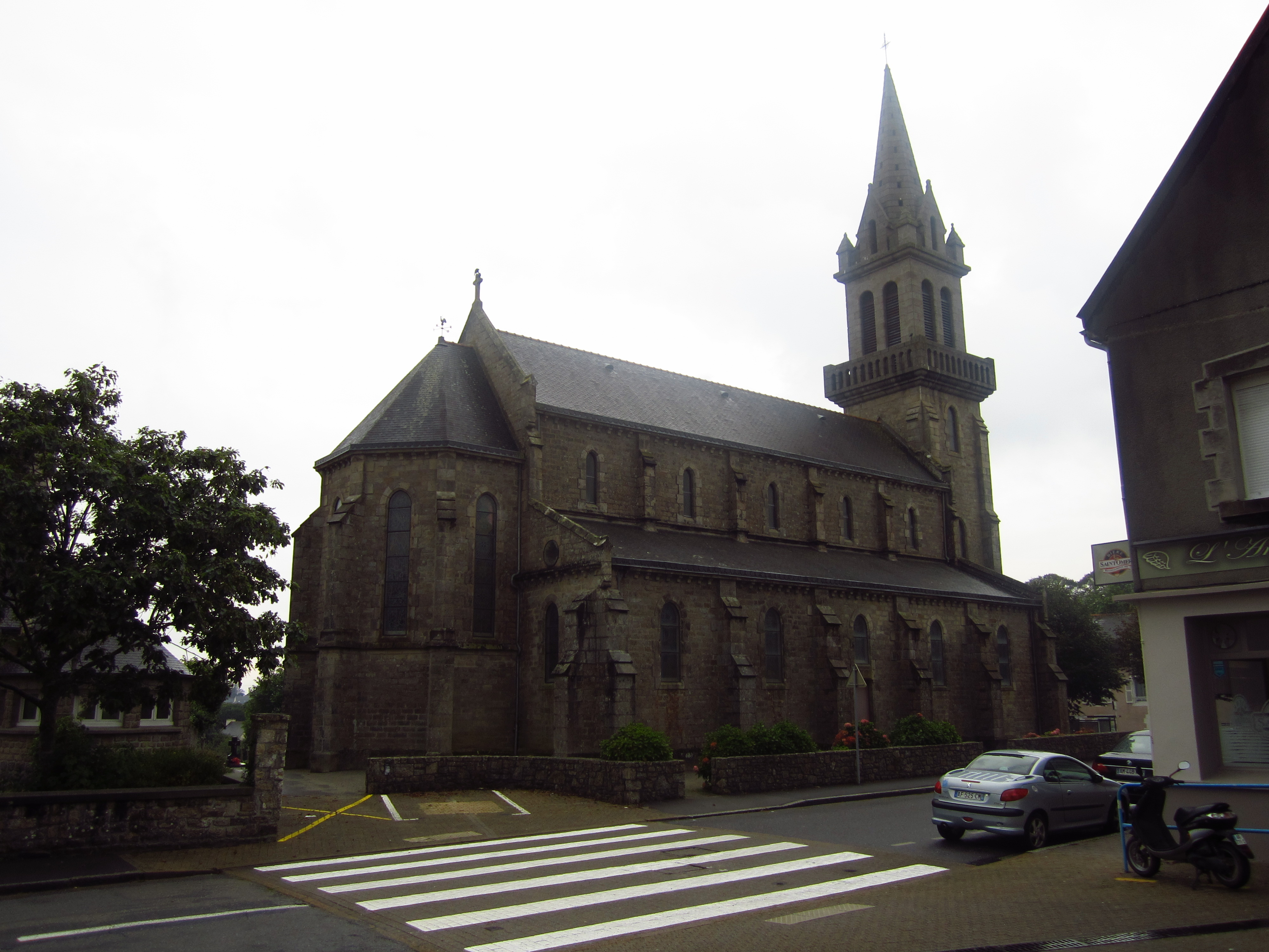 L'église Saint-Pierre-aux-Liens à Bohars dans le Finistère